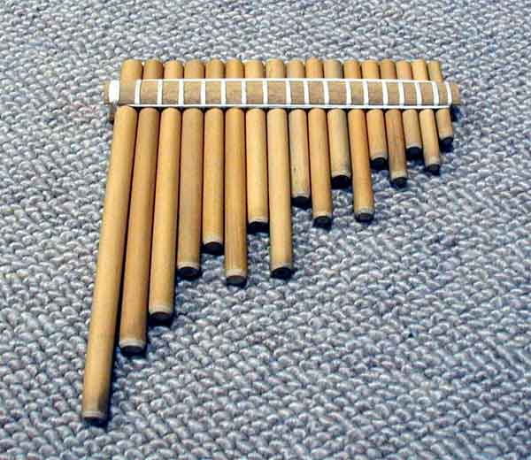 エクアドルの管楽器 ロンダドール